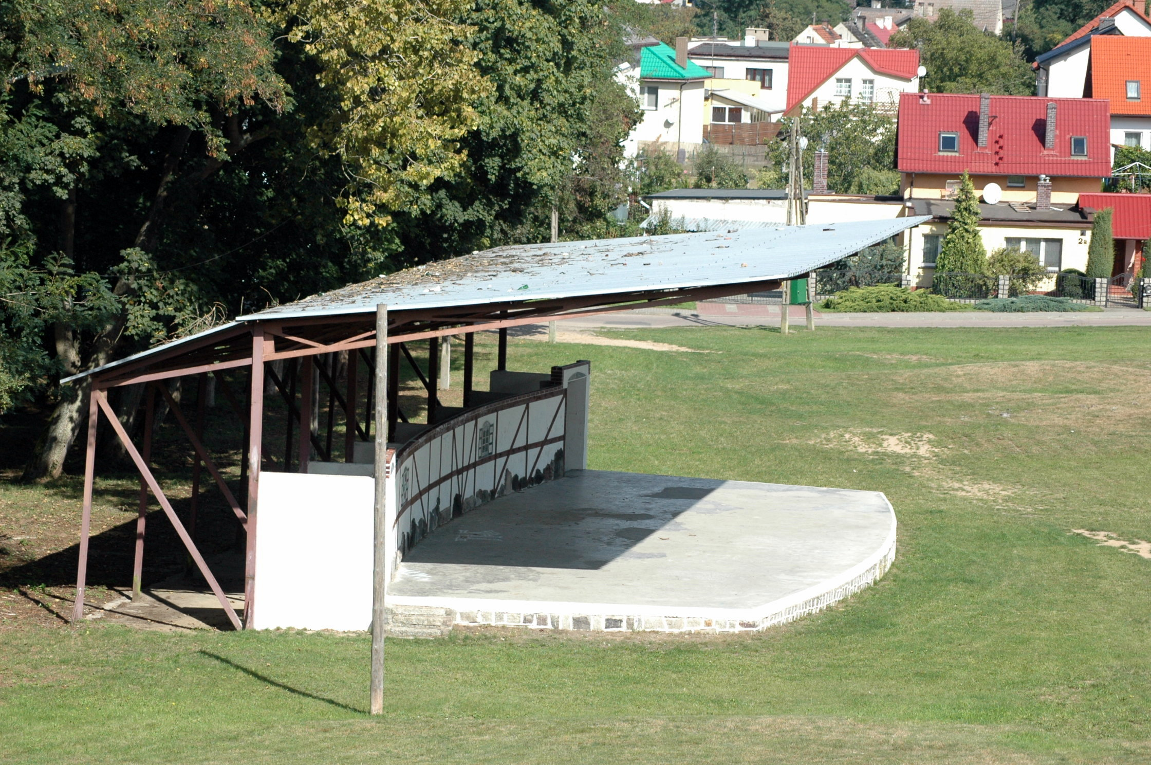 Amfiteatr w Wolinie